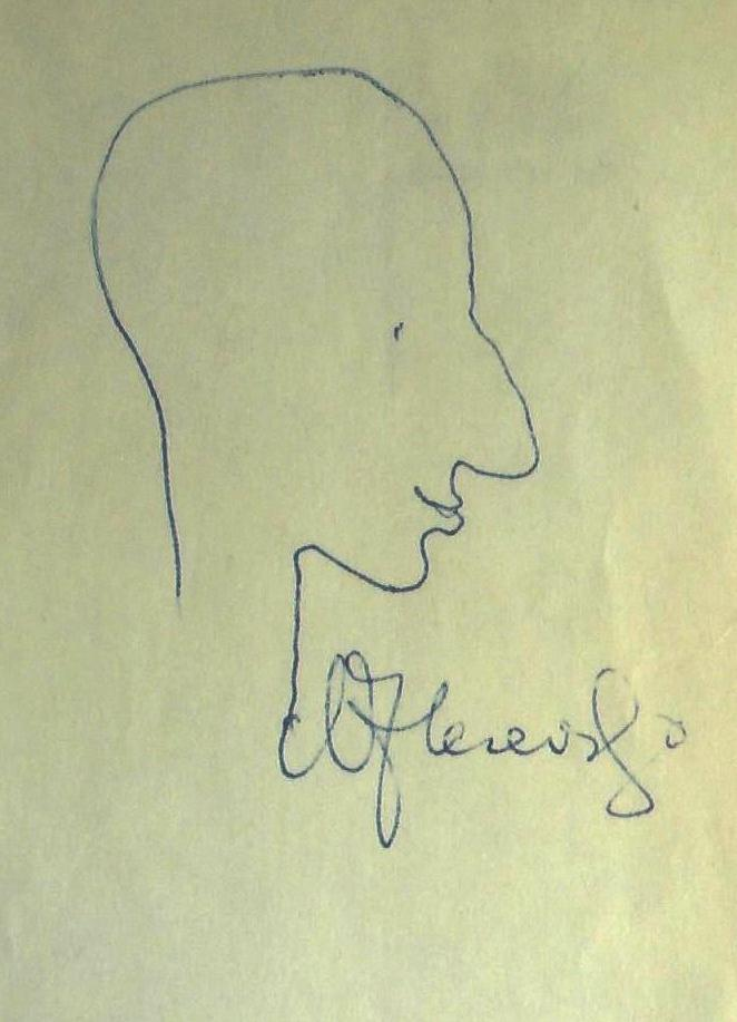 Marek Walczewski, autograf.